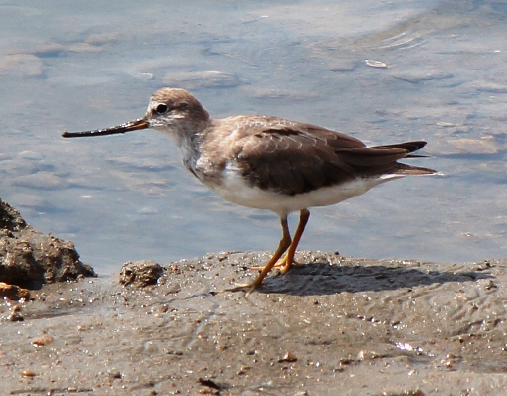 ソリハシシギ、庄内川河口にて